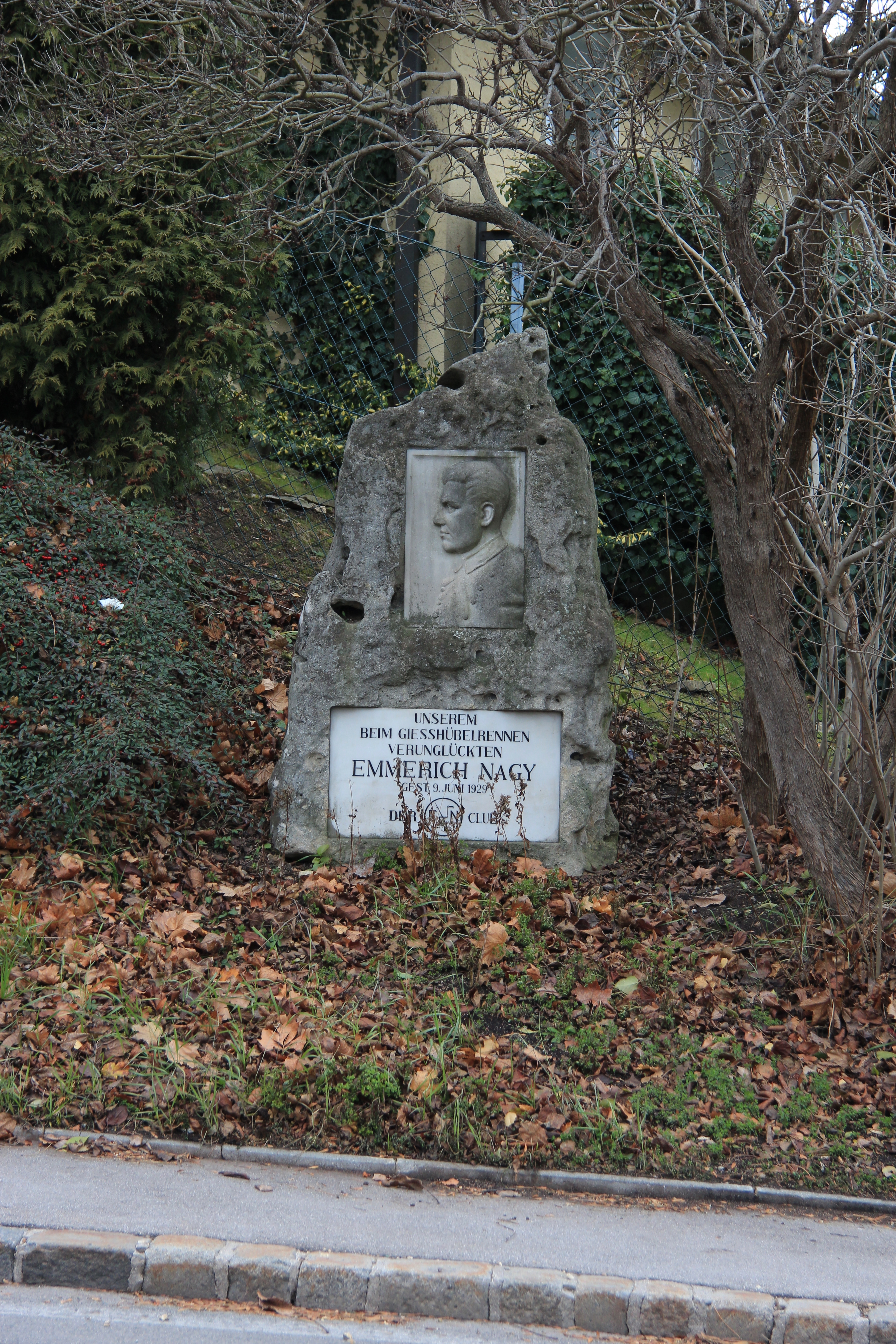 Denkmal für den beim Gießhübelrennen in Maria Enzersdorf am 26. Mai 1929 verunglückten Rennfahrer Emmerich Nagy